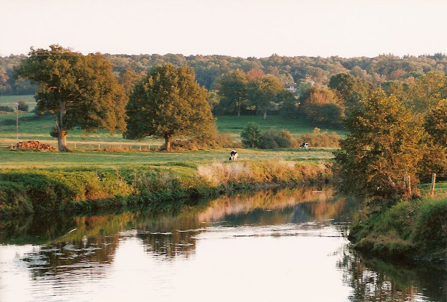 La Sarthe vue depuis Condé-sur-Sarthe (Orne, Basse-Normandie, France.)